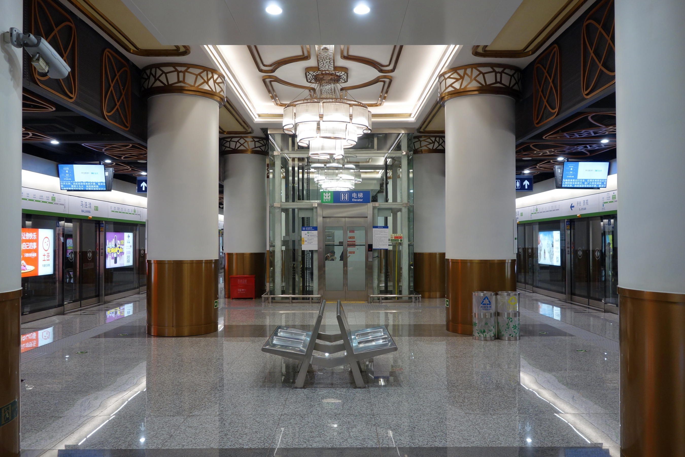 北京地铁16号线马连洼站岛式站台